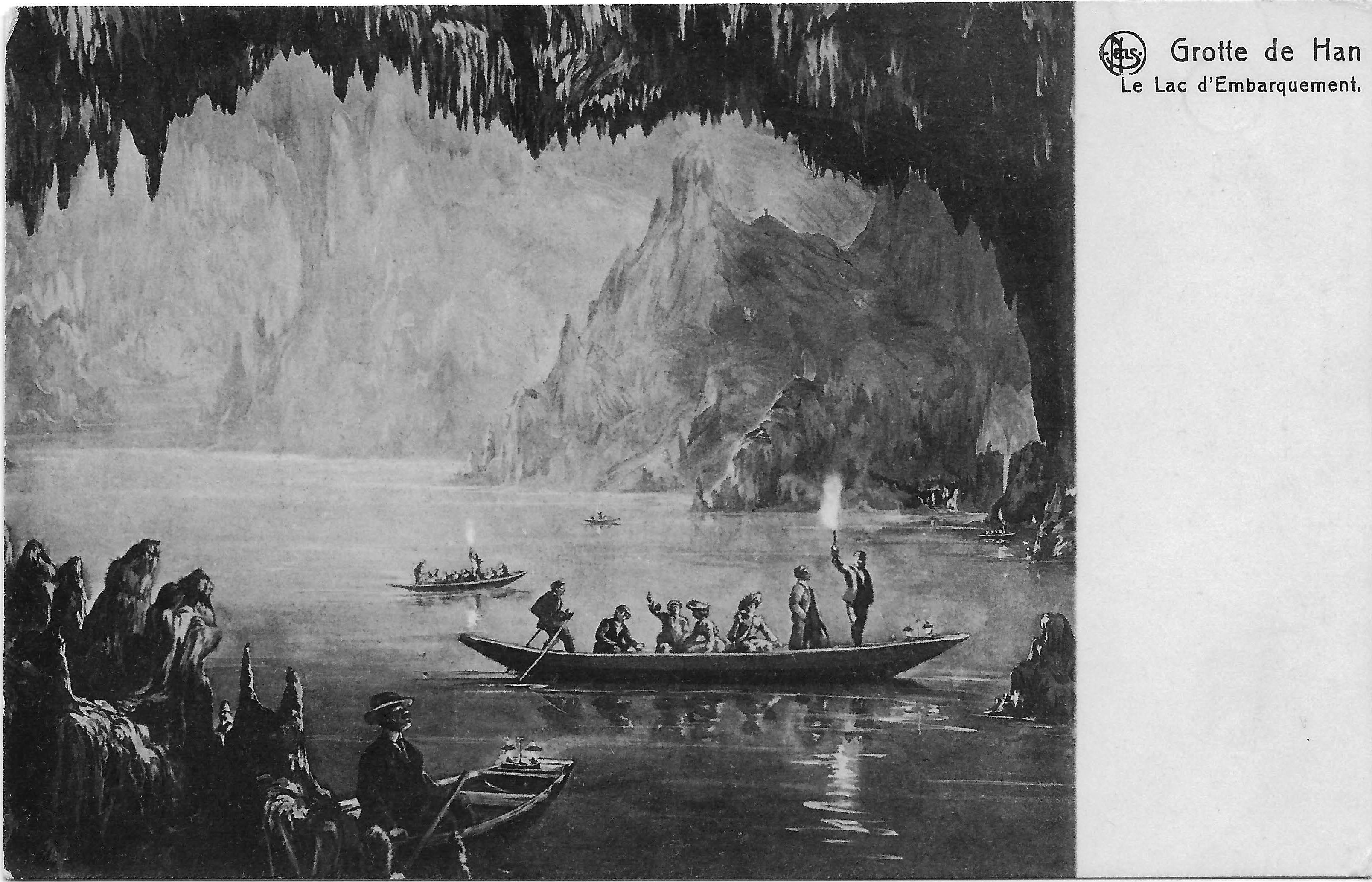 Een briefkaart met een illustratie van de grotten van Han